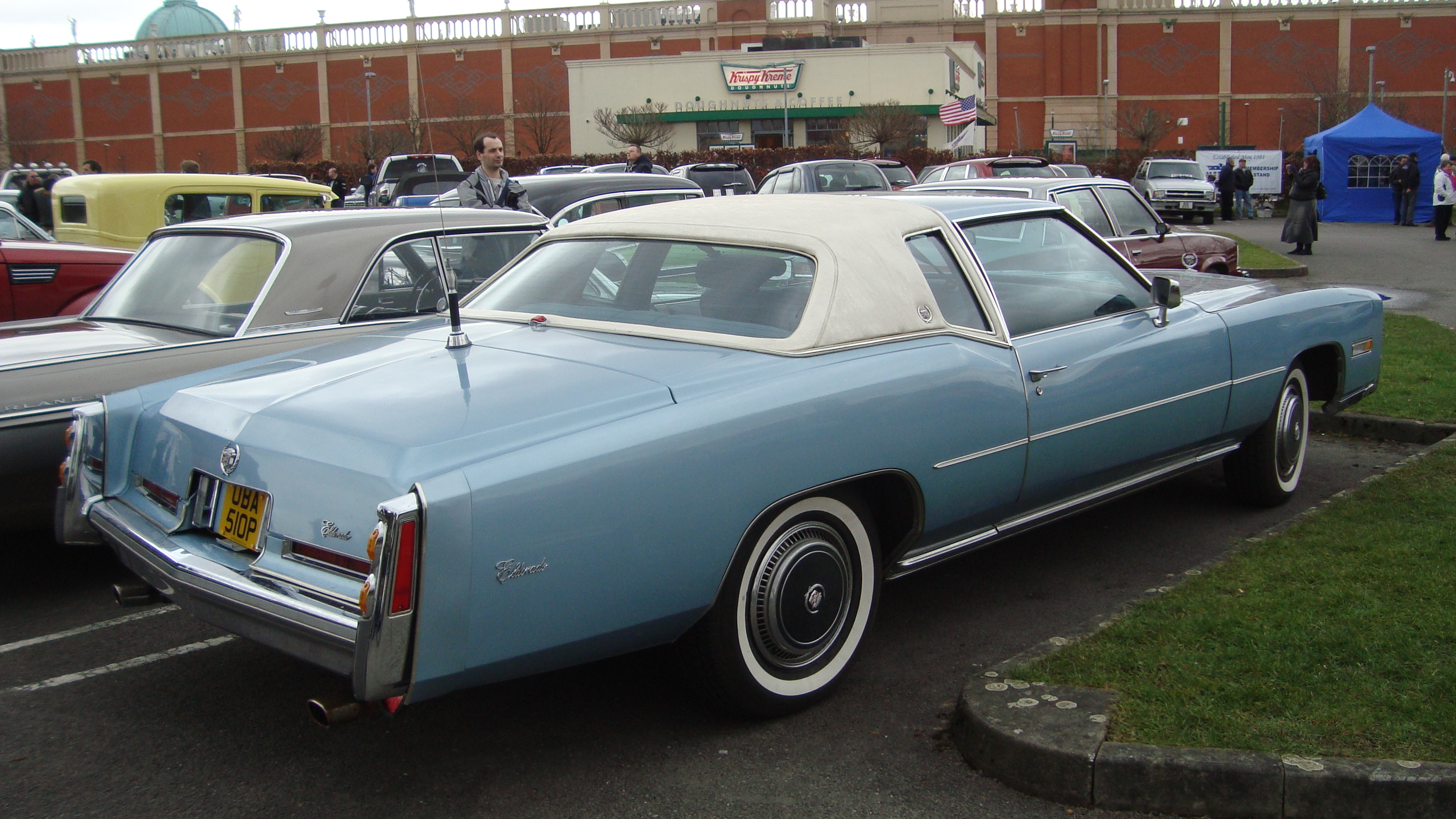 1976 Cadillac Eldorado 8.2 V8